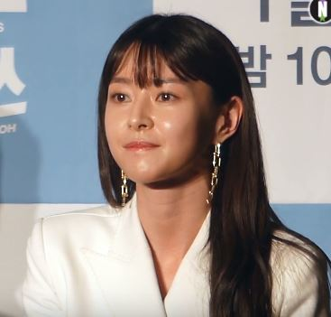 30일 오후 서울시 영등포구 여의도동 콘래드 서울 호텔에서 JTBC 새 금토드라마 ‘이태원 클라쓰’ 제작발표회가 열려 배우 박서준, 김다미, 유재명, 권나라가 참석해 기자 질의 응답을 하고 있다.